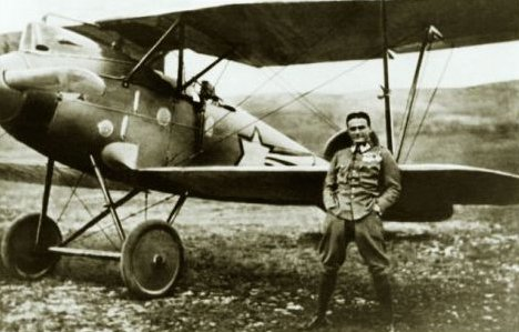 A Mo­nar­chia K.u.K. pi­ló­tá­ja. A 41. J. szá­zad­nál re­pü­lő Ka­sza­la Ká­roly Albat­ros DI­I­I gé­pé­vel 1917 nya­rán